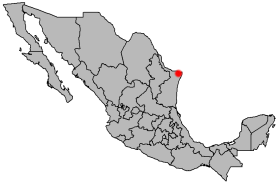 Locatie van Matamoros (Tamaulipas), zelf gemaakt